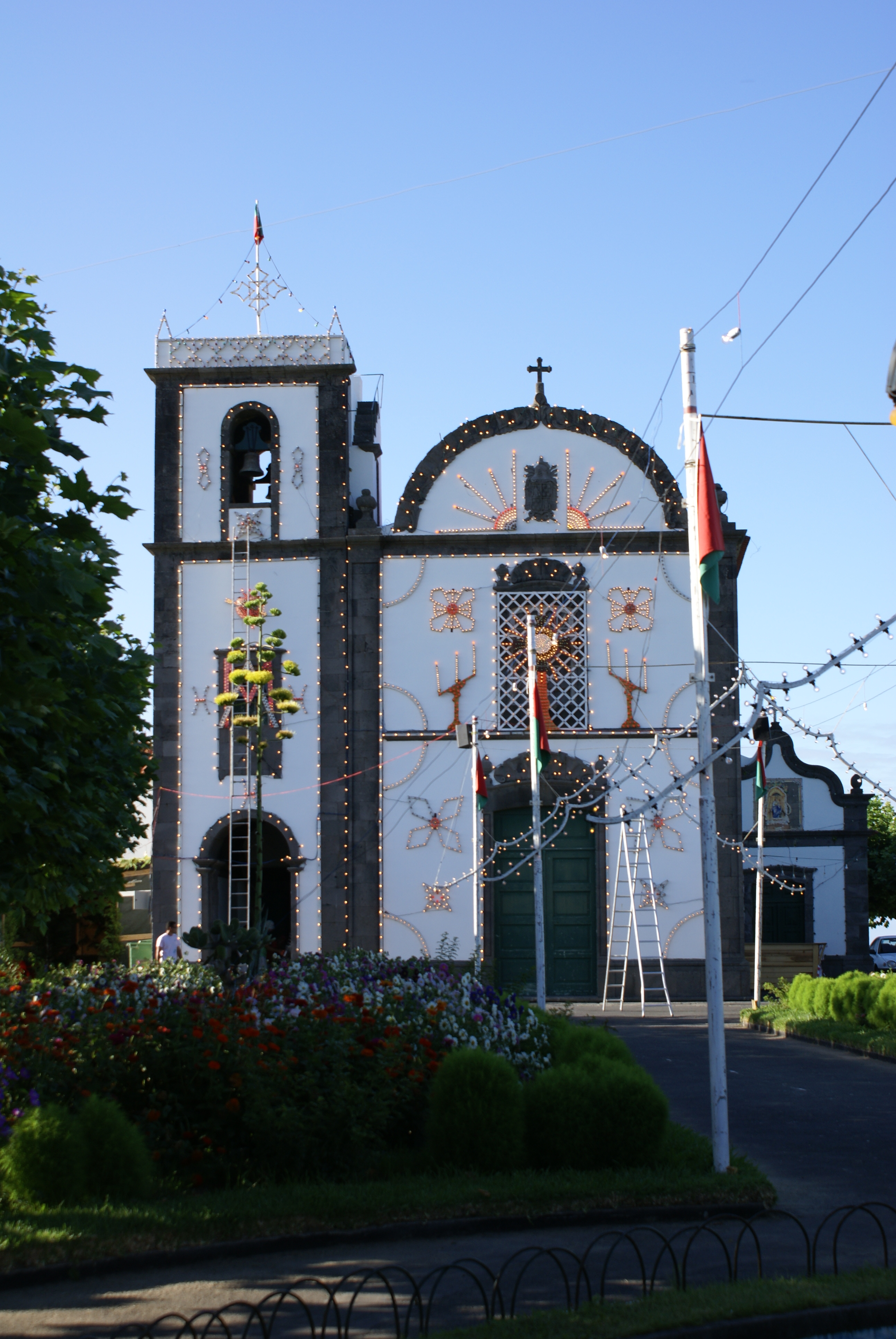 Ermida de Nossa da Ajuda, Fenais da ajuda, Ribeira Grande, ilha de São Miguel, Açores